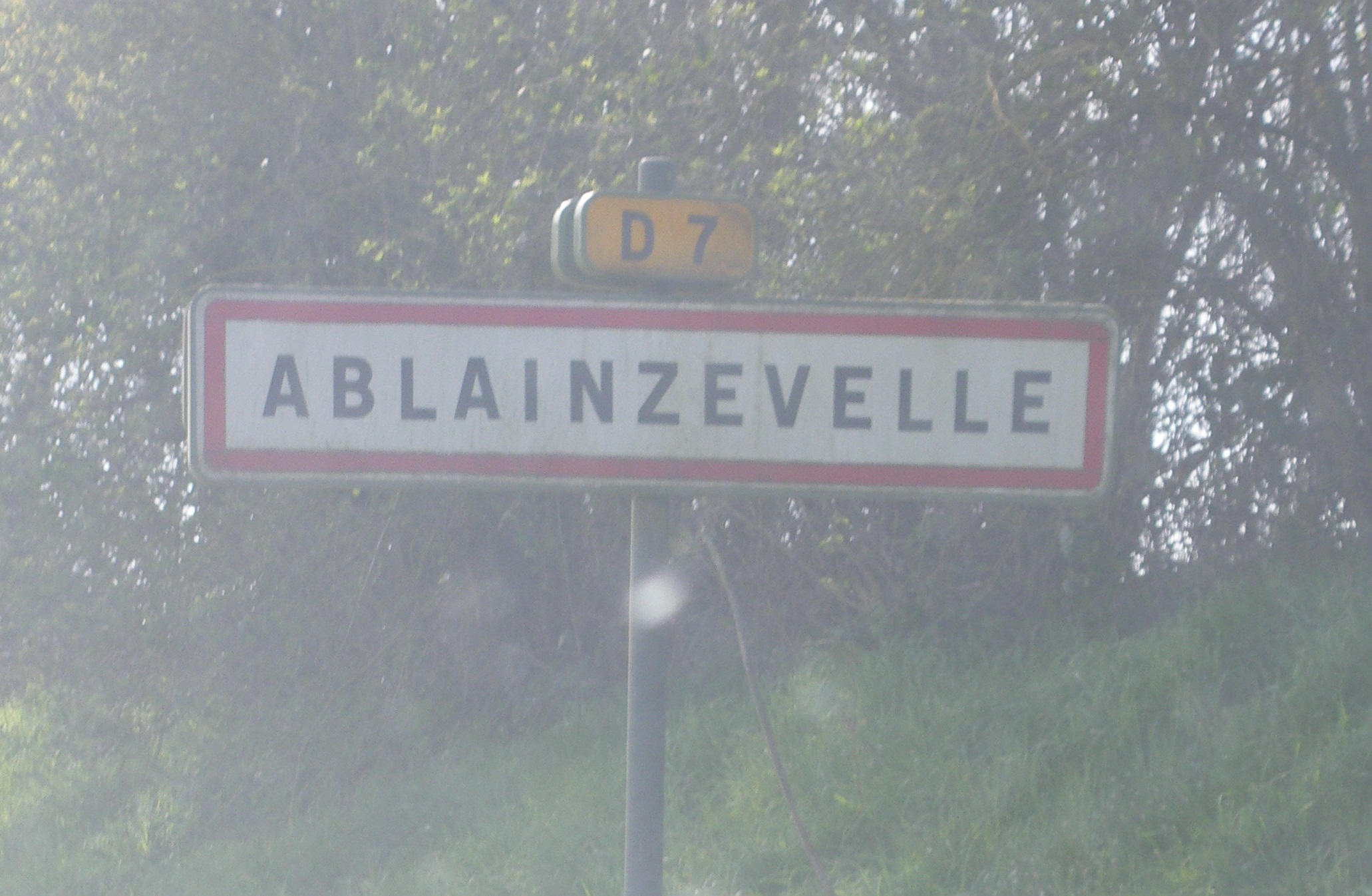 Un panneau d'entrée de la commune d'Ablainzevelle.